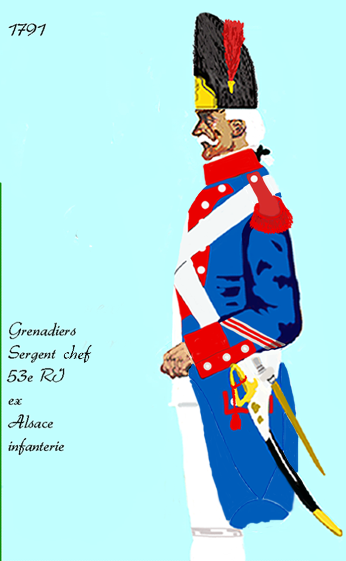 Uniform eines königlich französischen Infanterie-Regiments nach dem Erlaß von 1791. - Entnommen und überarbeitet aus: „LES UNIFORMES ET LES DRAPEAUX DE L'ARMÉE DU ROI“ Marseille 1899.